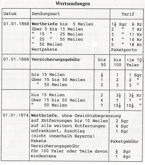 Das Wertporto zur Zeit des Norddeutschen Bundes